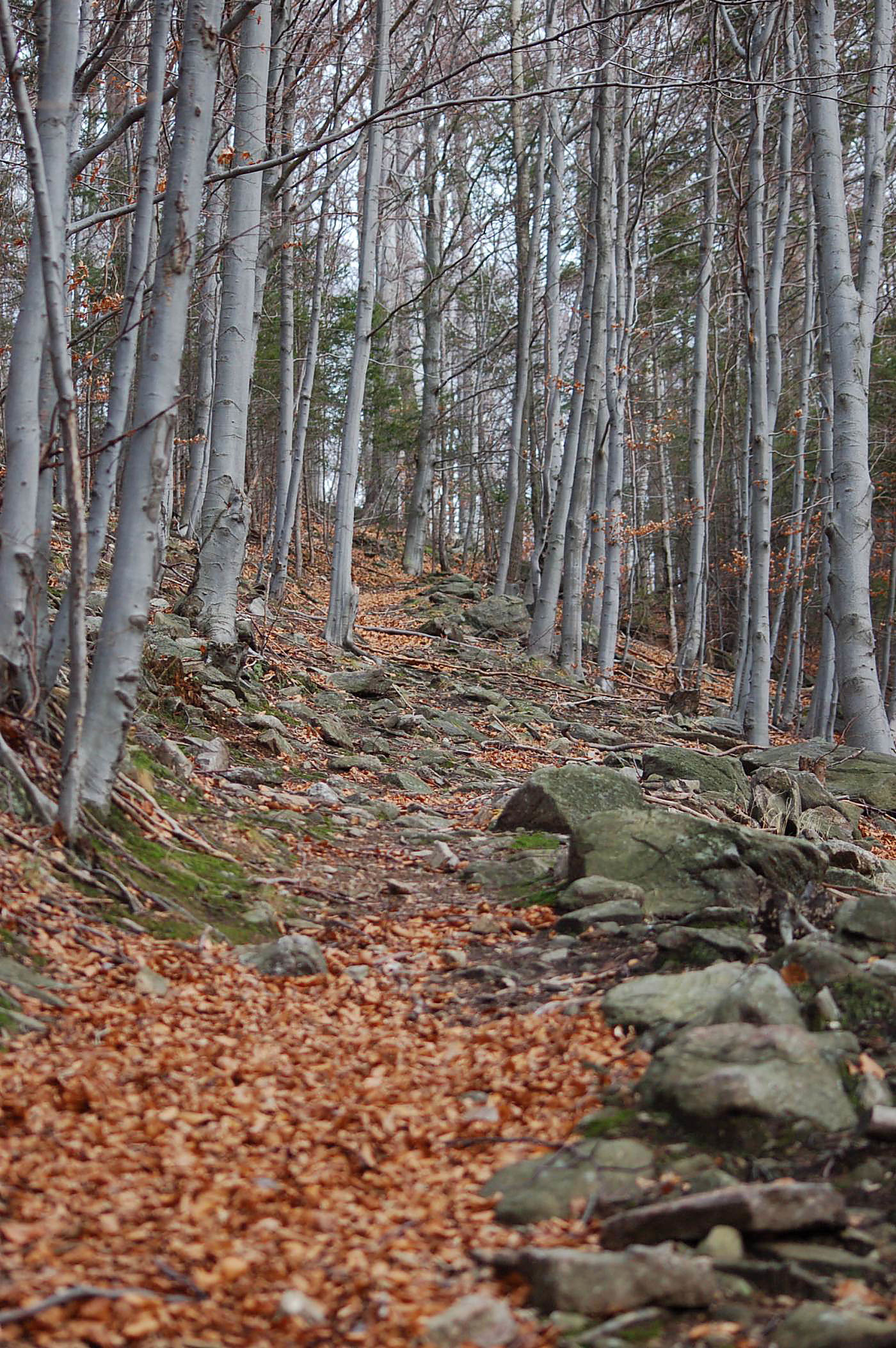 Fagus sylvatica in Sudety Polska